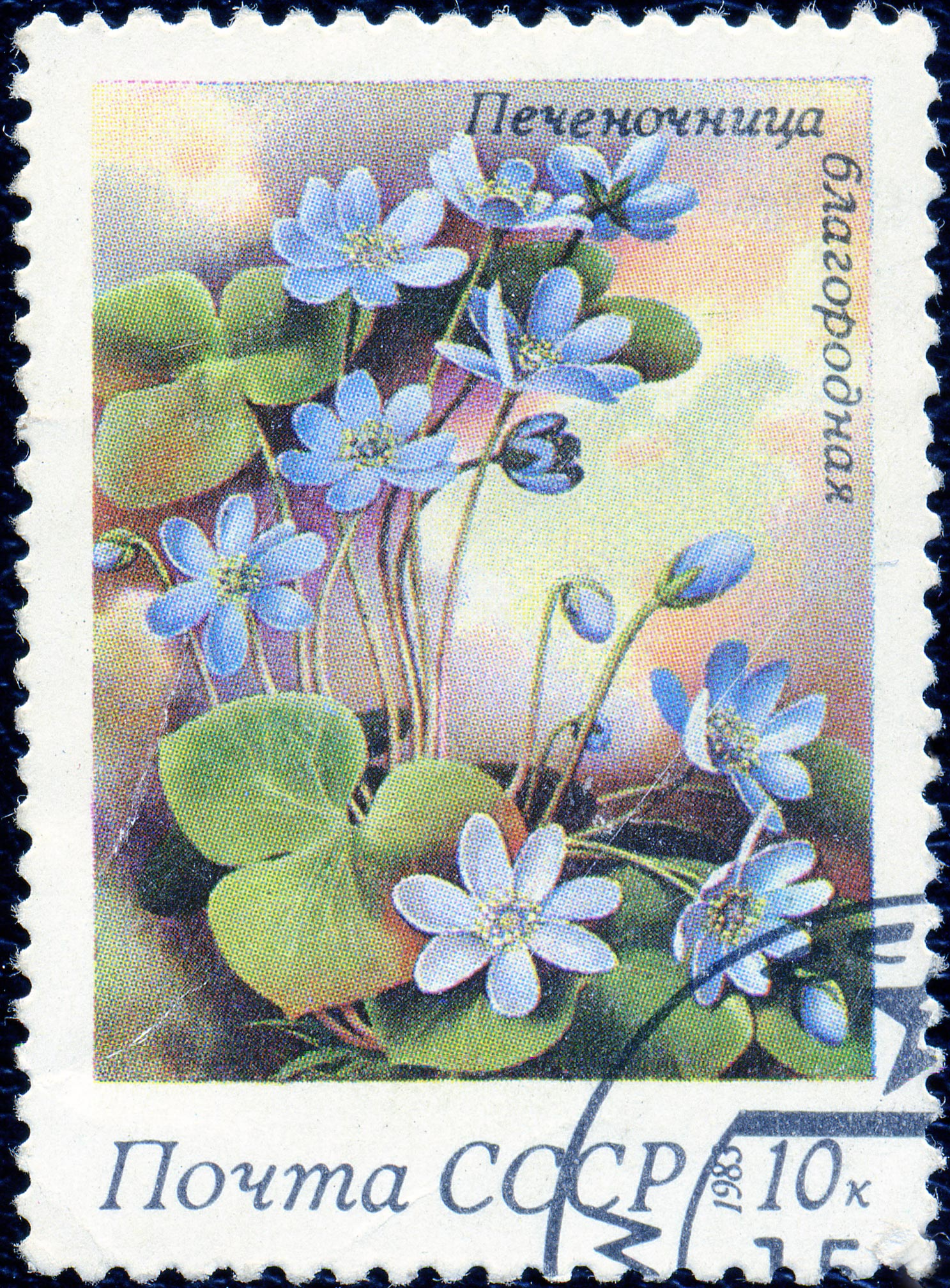 Почтовая марка СССР. 1983. Печеночница благородная